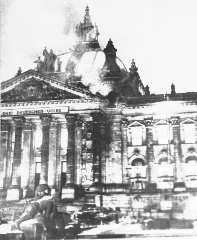 Berlin, brennender Reichstag (Reichstagsbrand) ADN-Zentralbild/Archiv/27.2.1933 Berlin: Das brennende Reichstagsgebäude Am 27. Februar 1933 wurde das Reichstagsgebäude durch einen von den Nationalsozialisten inszenierten Brand zerstört. Der Hitlerregierung diente er als Vorwand für einen Terrorfeldzug vor allem gegen Kommunisten und andere Antifaschisten. In diesem Zusammenhang wurde der bulgarische Kommunist Georgi Dimitroff festgenommen und im Reichstagsbrandprozess als Unschuldiger angeklagt. Aufnahme 1933 [Berlin.- Brennender Reichstag (Reichstagsbrand)]